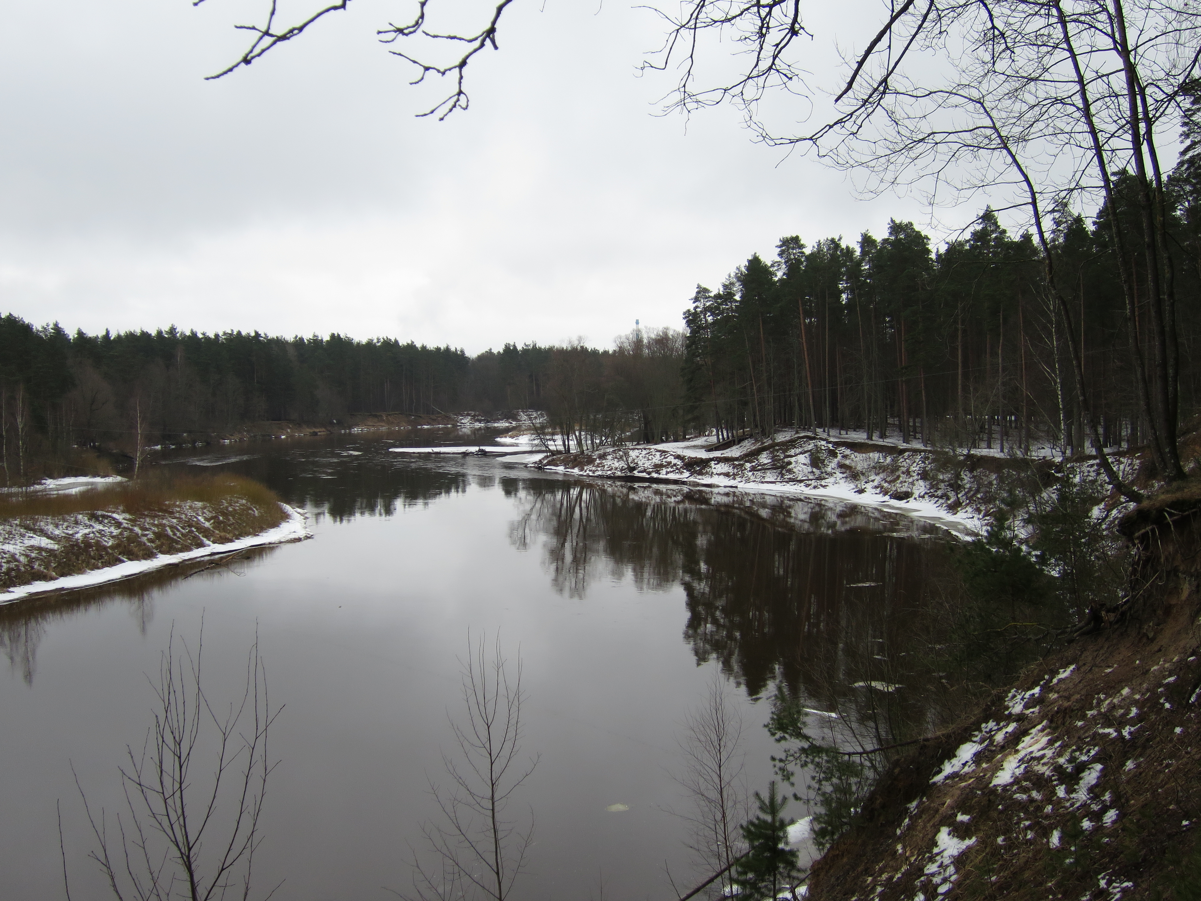 Gauja pie Stāvajiem krastiem Valmierā.